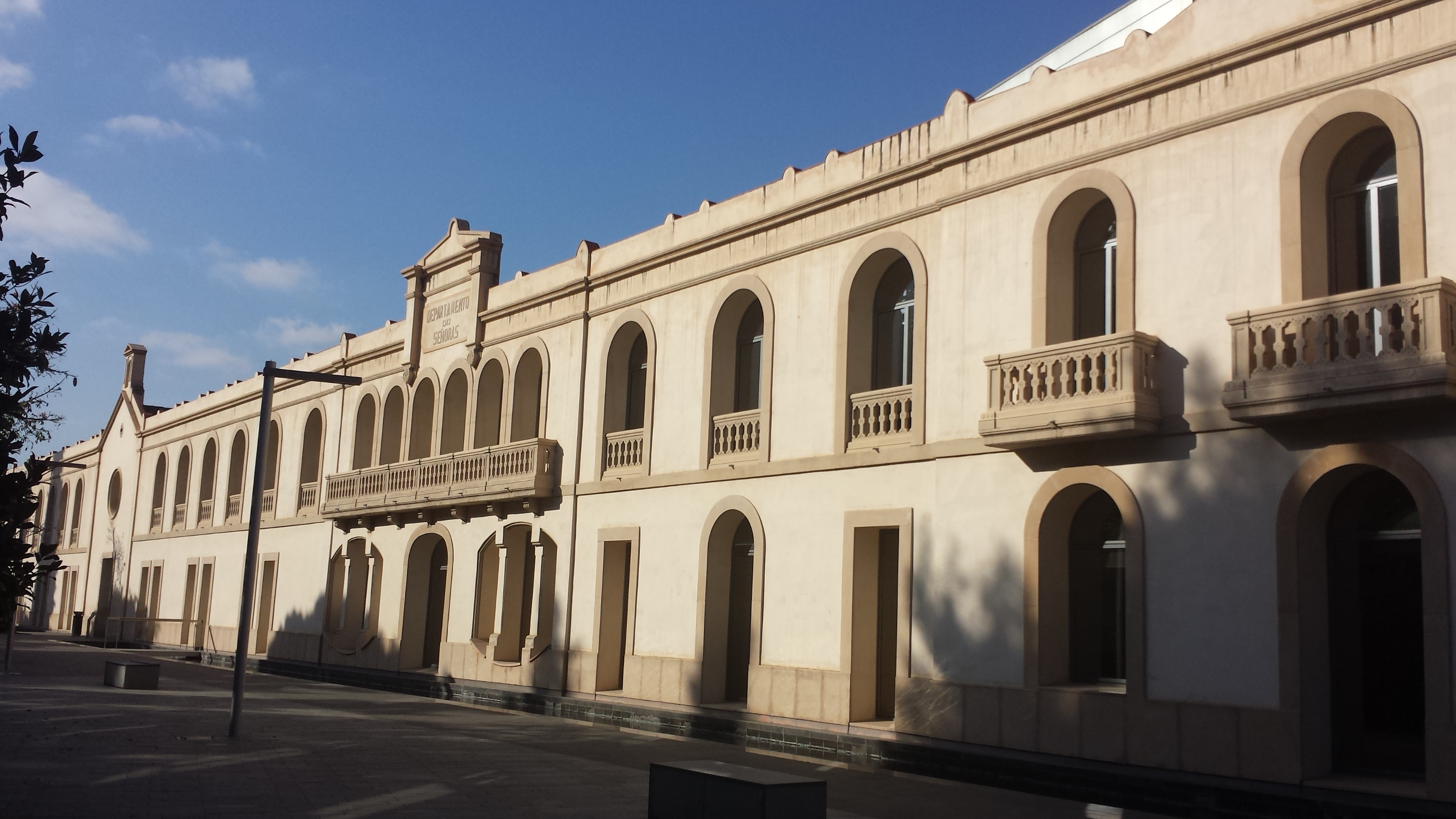 Departamento de Señoras, a l'antic Institut Frenopàtic, Les Corts, Barcelona. Actualment Hospital Dexeus.